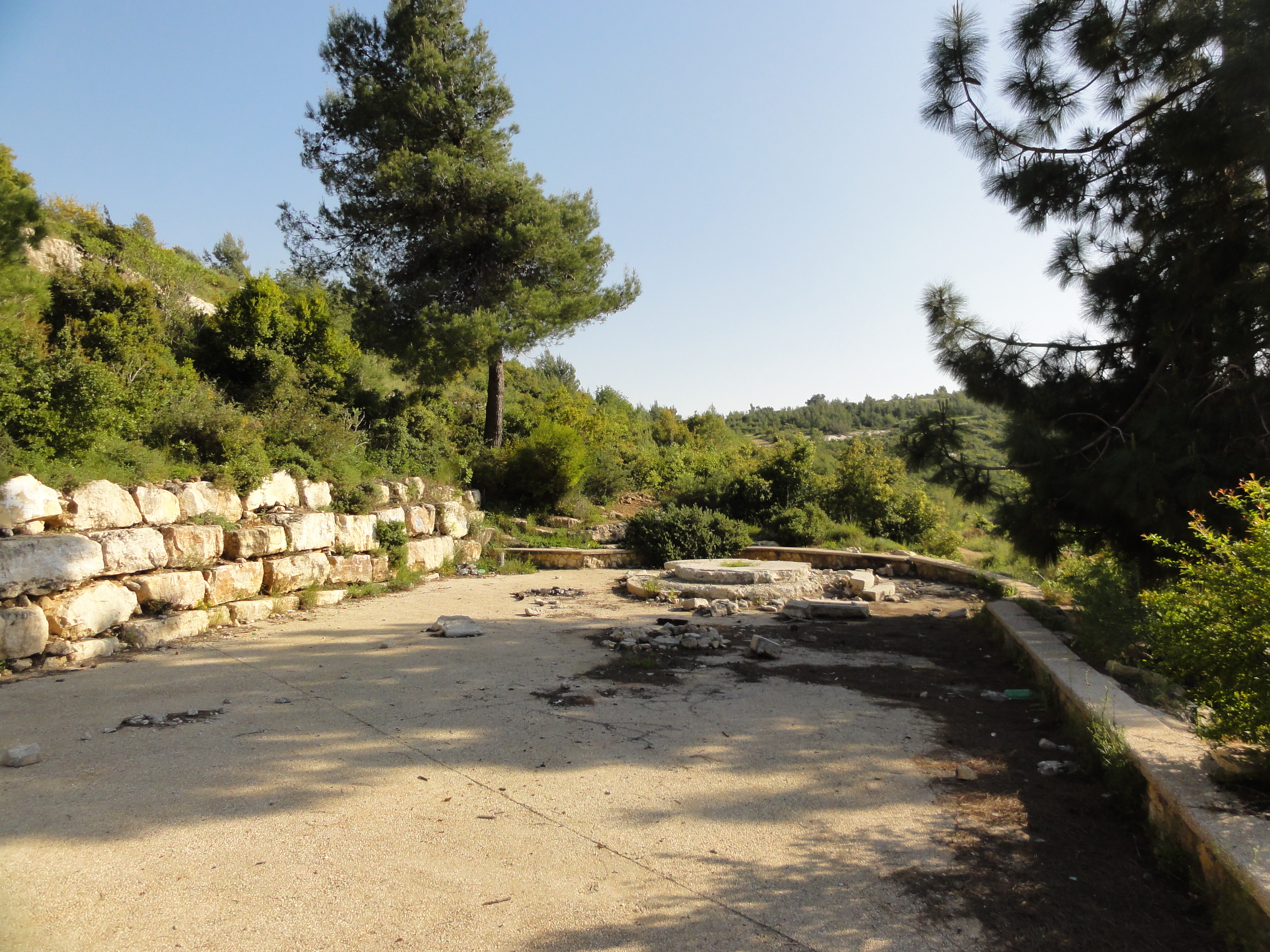 אתר ההנצחה לחללי פיגוע קו 405 (כפי שצולם באפריל 2016)